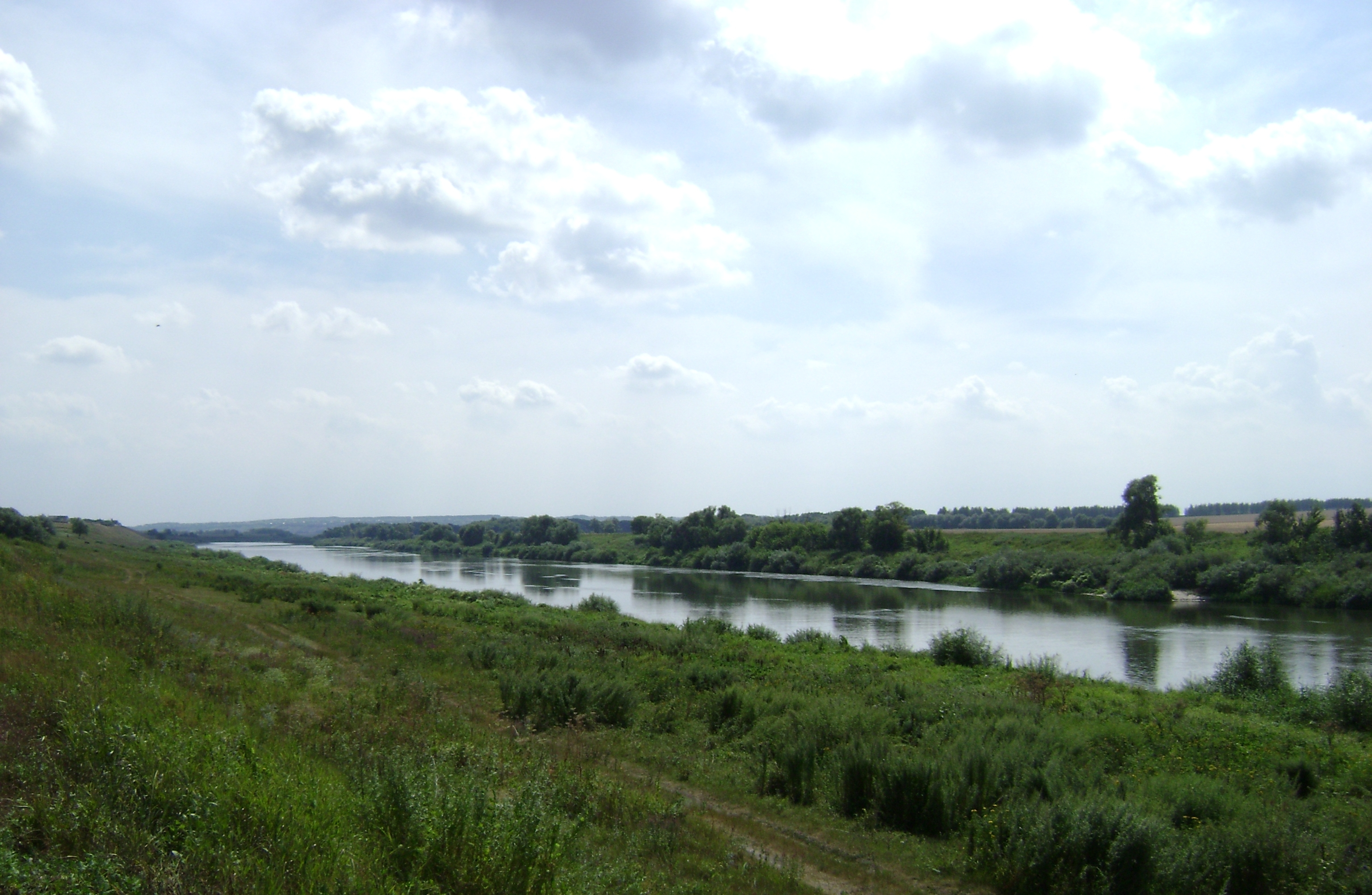 Левый берег реки Дон напротив Горожанки (Рамонский район, Воронежская обл., Россия)